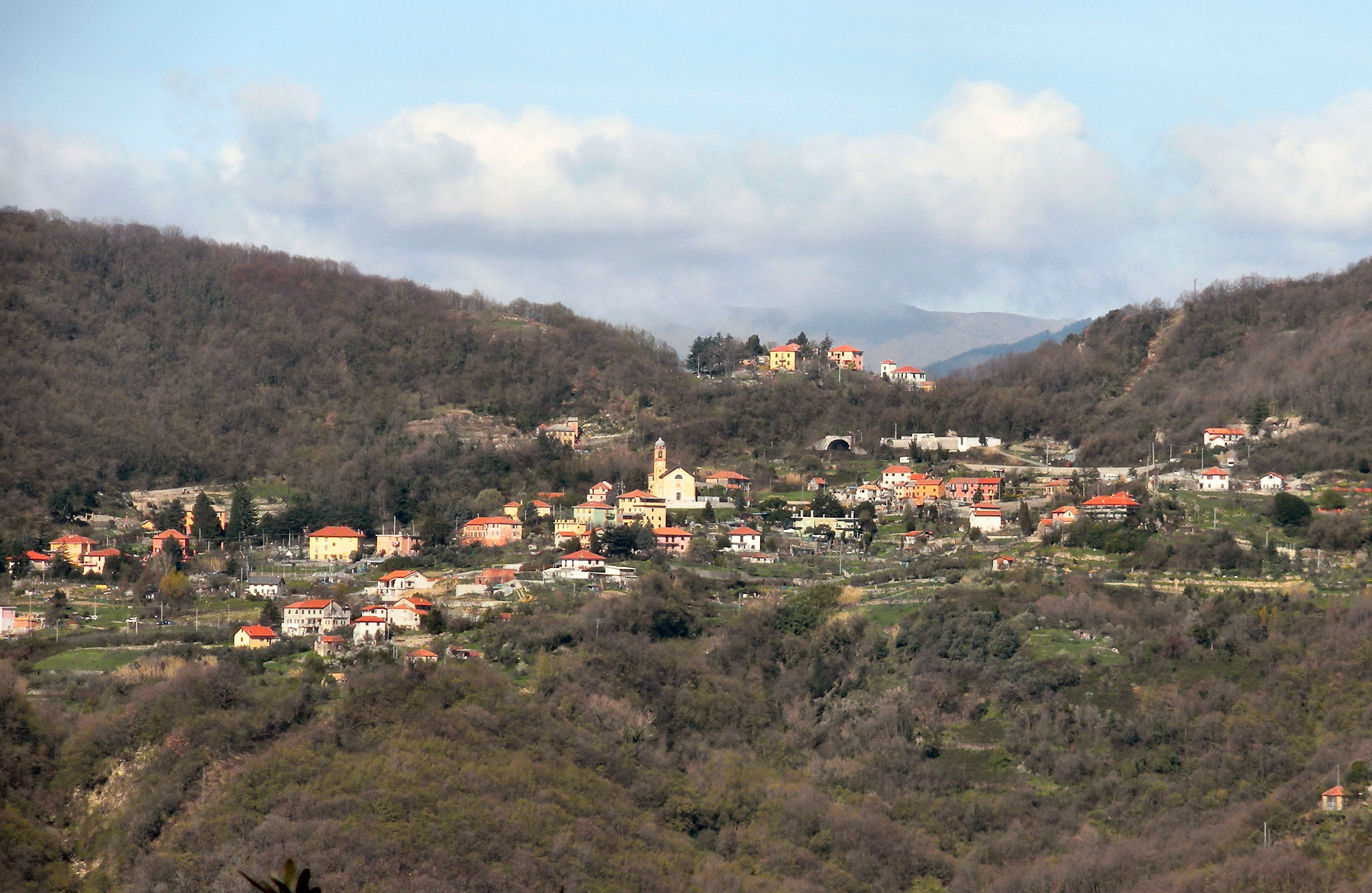 Panorama di Pino Soprano (Molassana, quartiere di Genova)